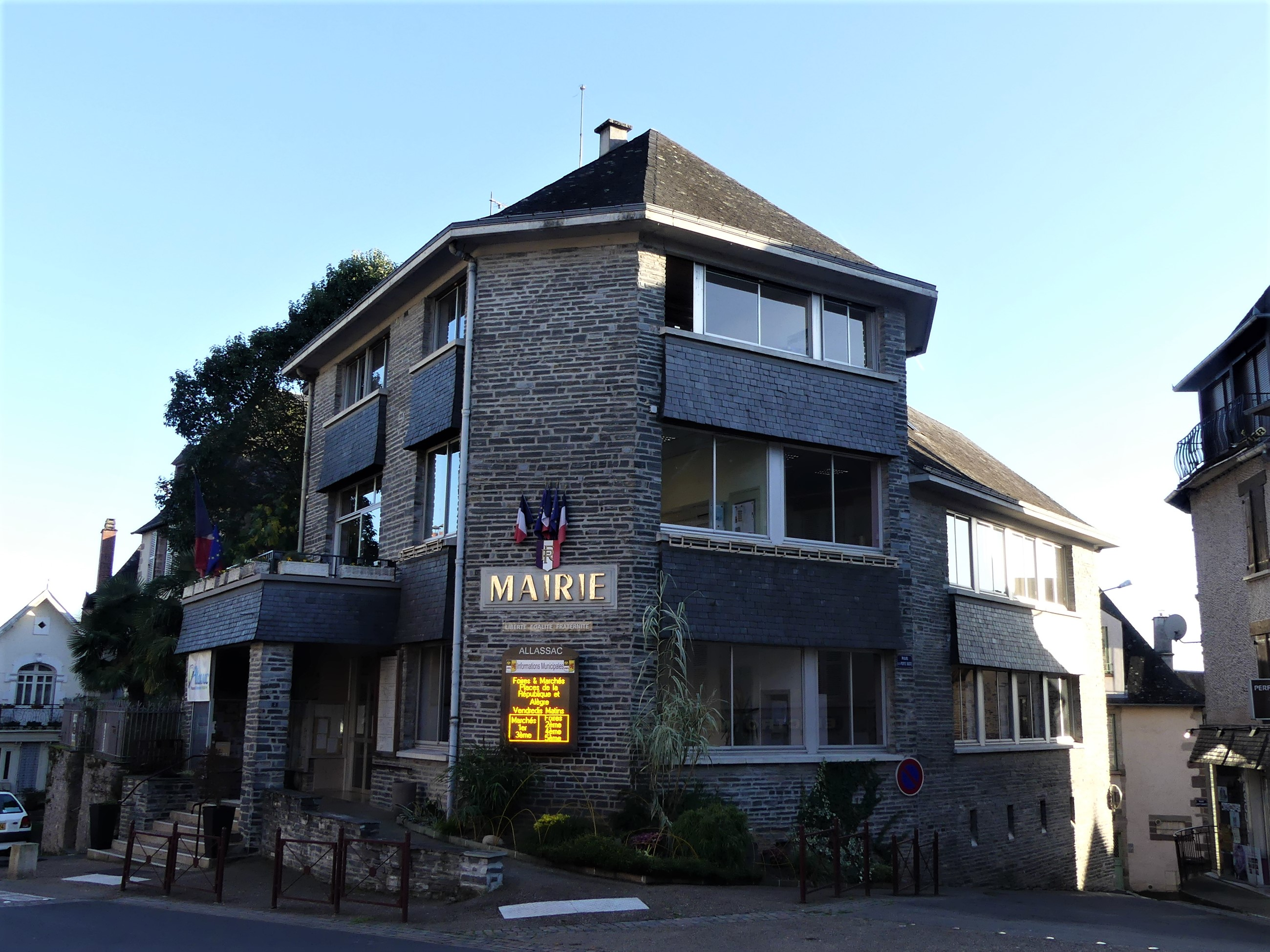 La mairie d'Allassac, Corrèze, France.